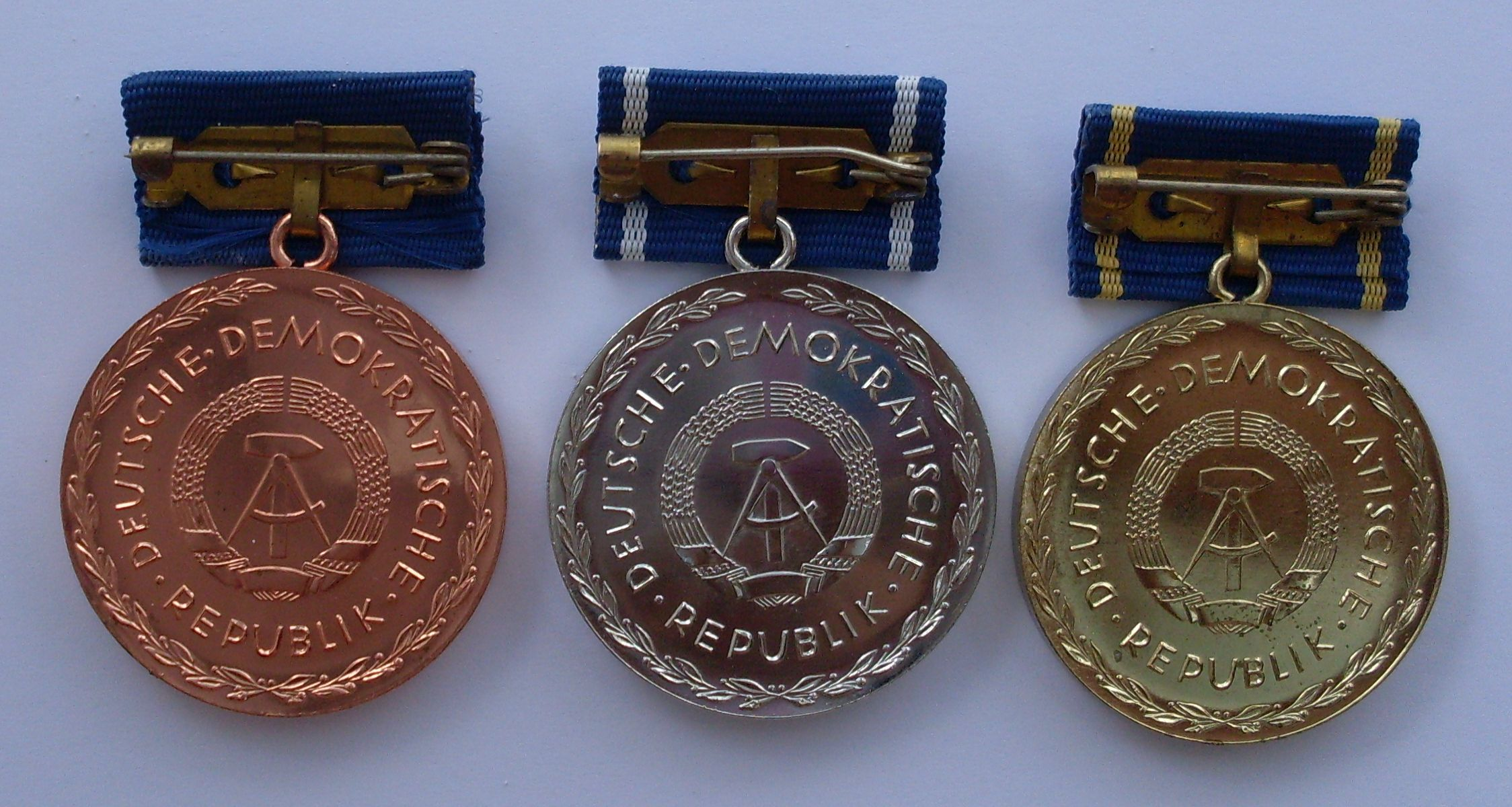 Pestalozzi Medaillen (hinten)